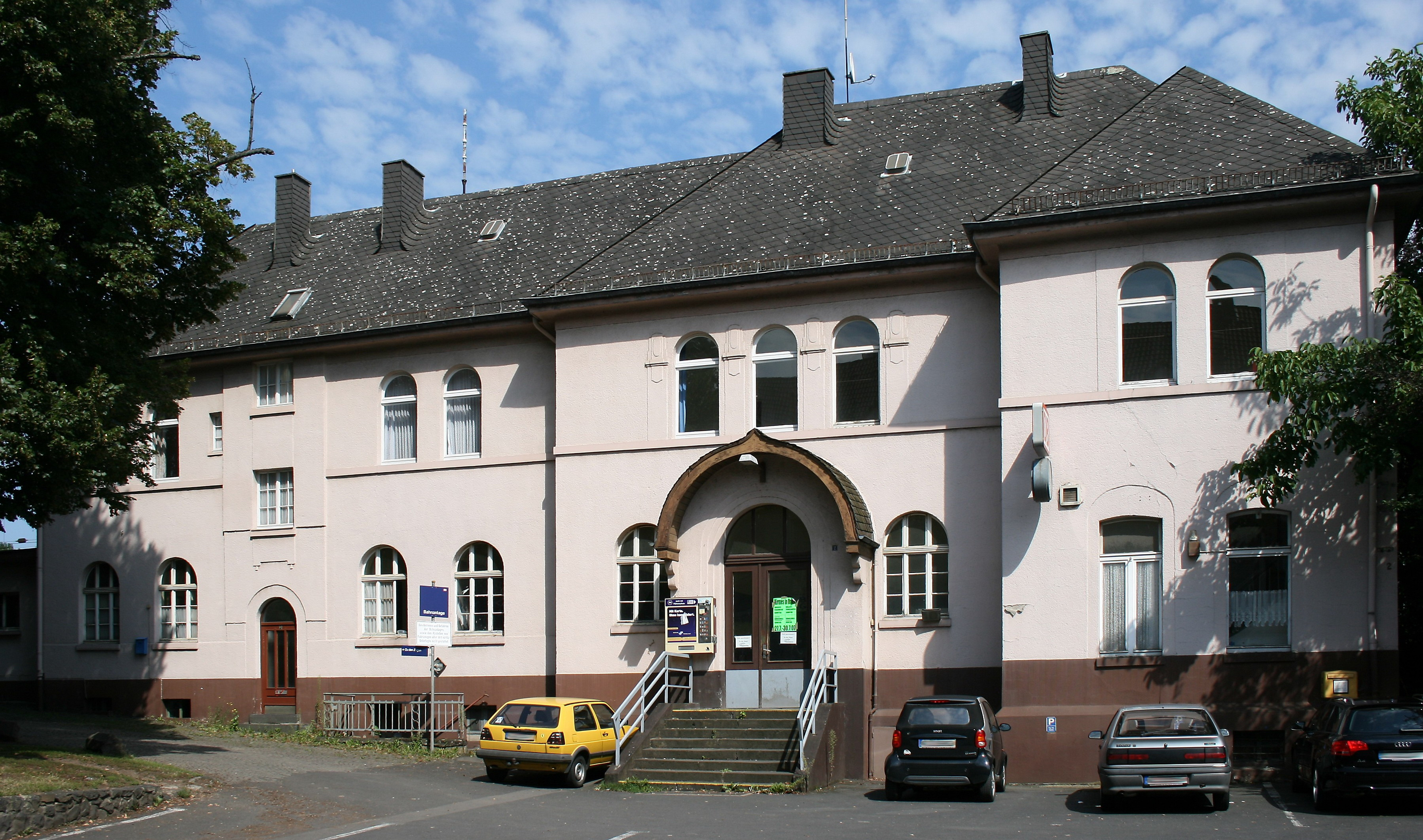 Die Westfassade des Unkeler Bahnhofsgebäudes